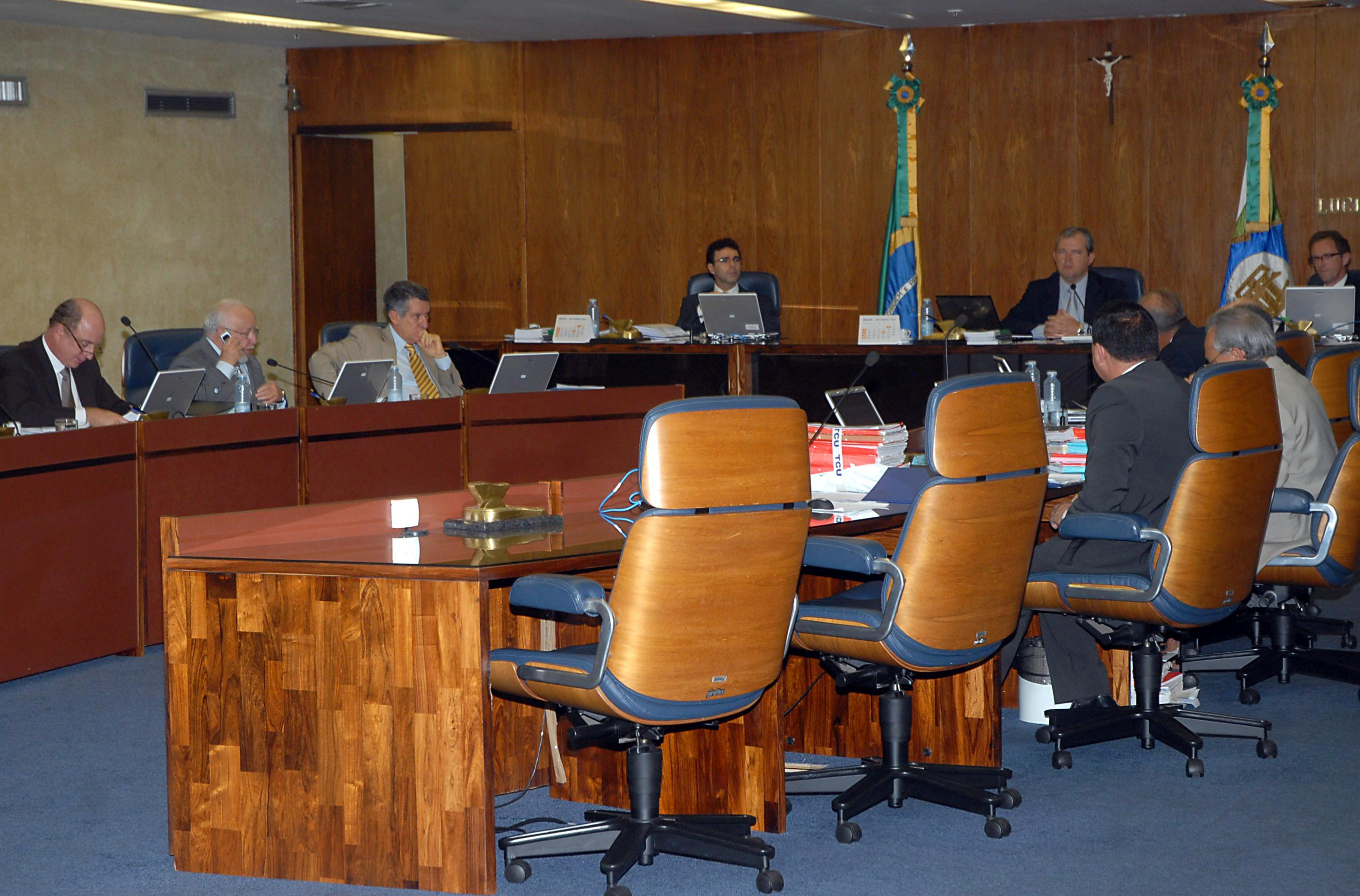 Brasília - O presidente do Tribunal de Contas da União (TCU), ministro Adylson Motta, preside sessão que analisa condições para realização de leilão das obras da Usina de Santo Antonio, no rio Madeira Foto: Valter Campanato/ABr